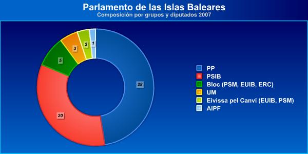 Composición del Parlament de les Illes Balears 2007